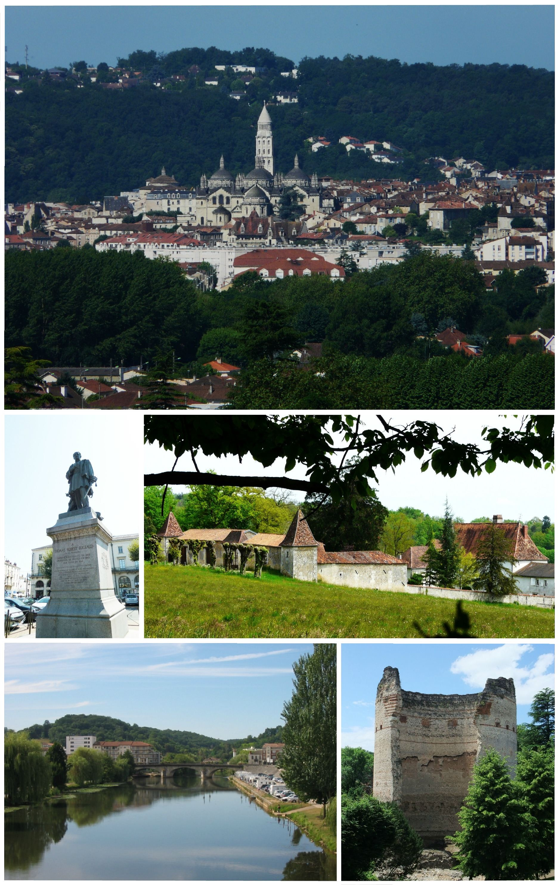 Dans le sens des aiguilles d'une montre à partir d'en bas à gauche : vallée de l'Isle ; statue de Bugeaud sur la place qui porte son nom ; vue générale de Périgueux depuis les hauteurs de Trélissac, avec en premier plan la cathédrale Saint-Front ; le château de Barbadeau ; la Tour de Vésone près du musée Vesunna.